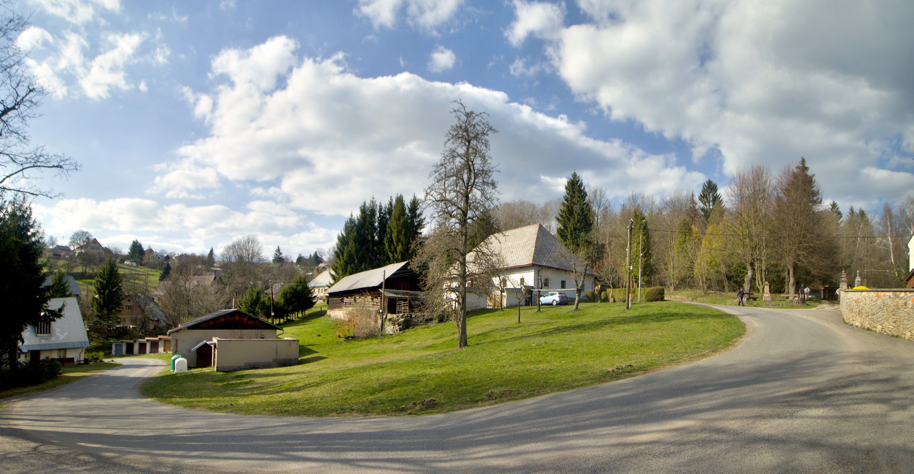 Benecko-Horní Štěpanice